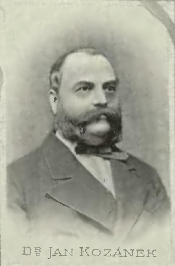 Portrét – Jan Kozánek (1819 - 1890), Český advokát, novinář a politik.